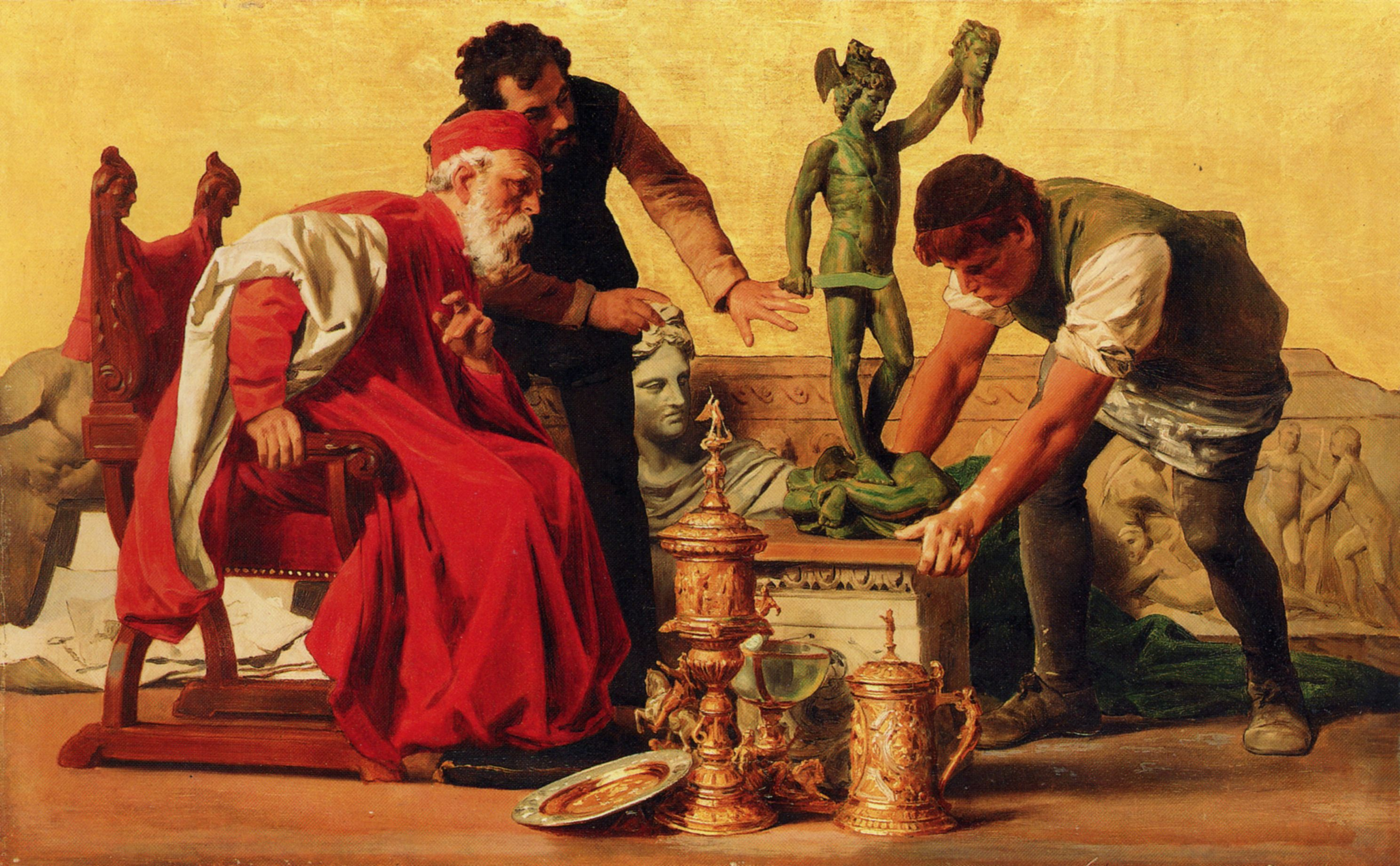 Farbskizze zum Bild Ars im Mosaikfries am Palais Pringsheim, Berlin